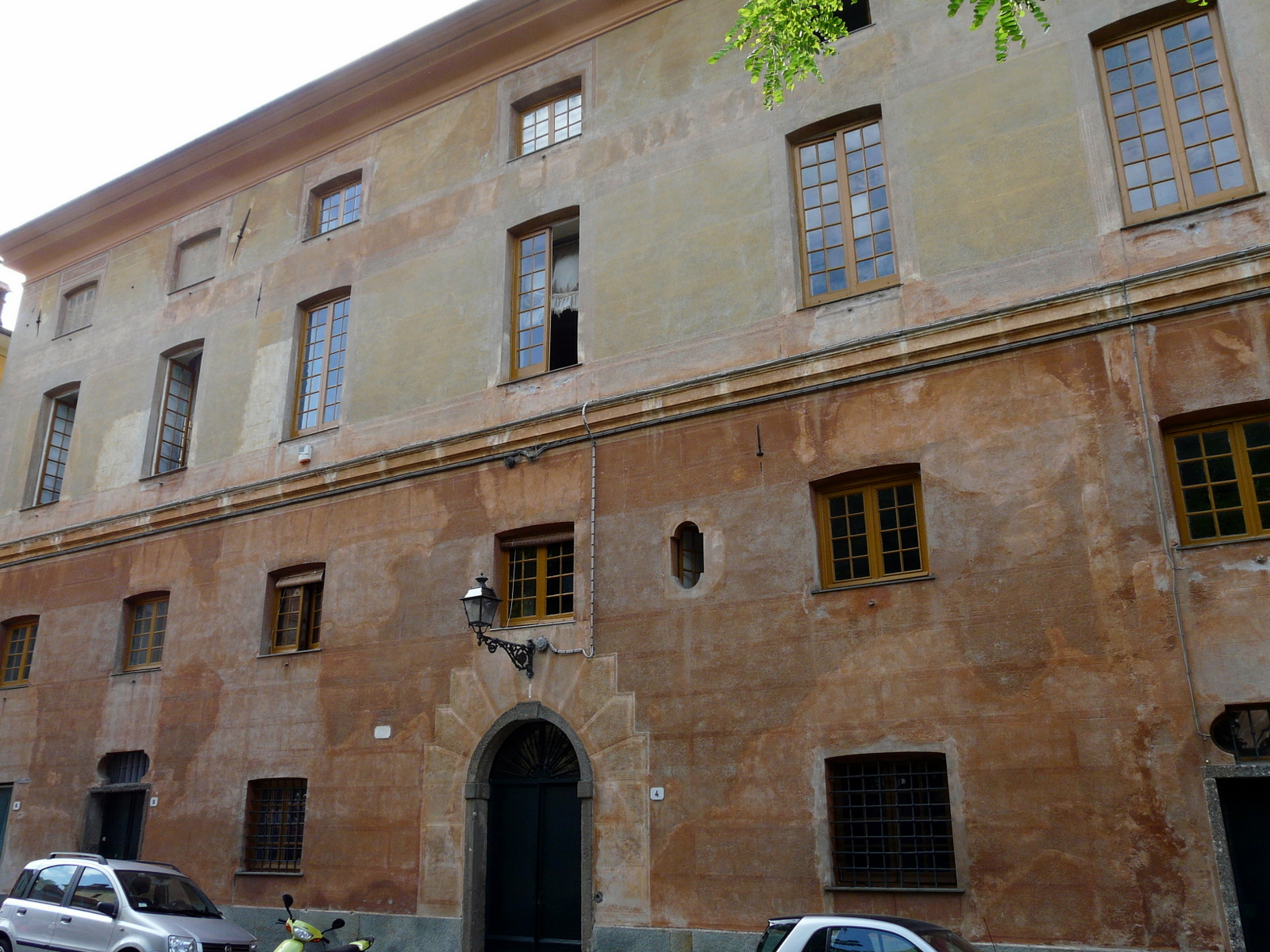 Palazzo Crosa di Vergagni, già ospedale cittadino, Savignone, Liguria, Italia